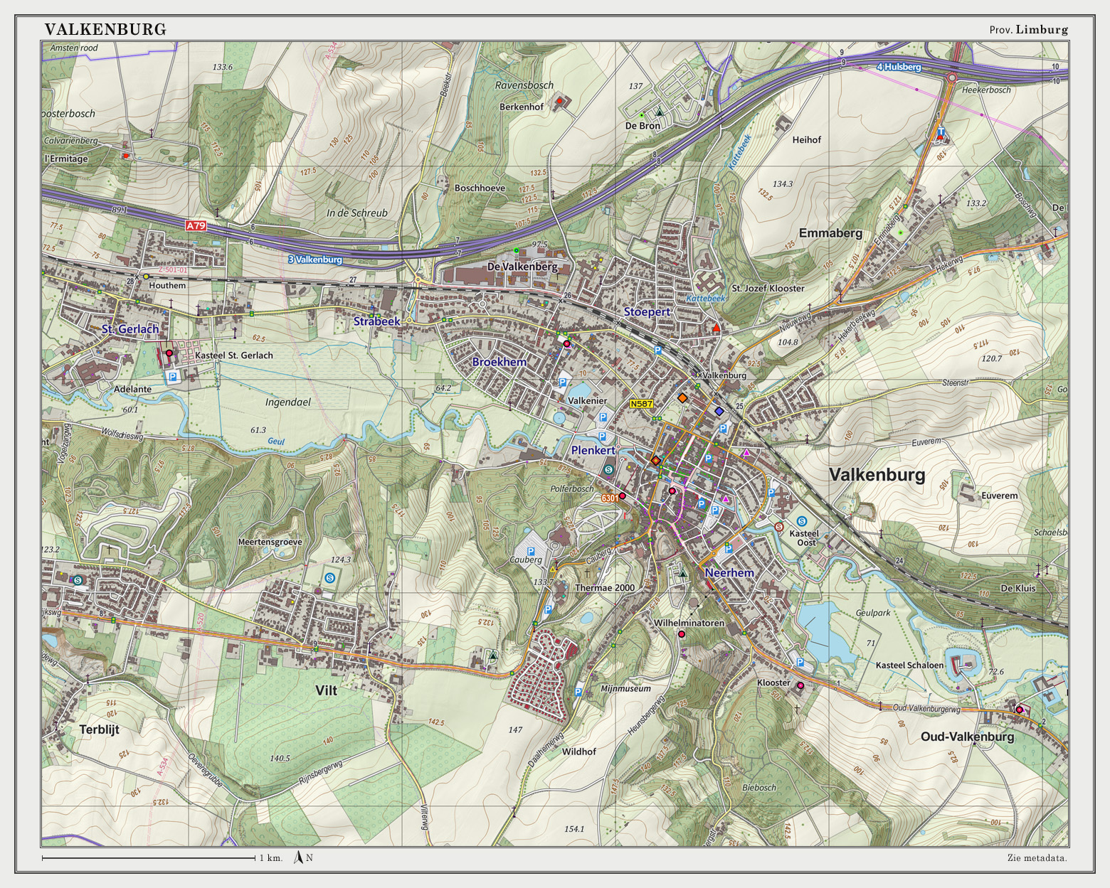 Topografische kaart van Valkenburg (woonplaats). Resolutie: 300 pixels/km. Kaartbeeld samengesteld uit de open geodata van de Top10NL en Top25namen (Basisregistratie Topografie, Kadaster), Creative Commons BY licentie. Gebouwvlakken uit open geodata BAG extract. Wegen uit de OpenStreetMap. Reliëfschaduw uit de Actuele Hoogtekaart AHN2. Samenstelling en kleurenschema: Jan-Willem van Aalst, met QGIS2. Zie ook de Legenda.